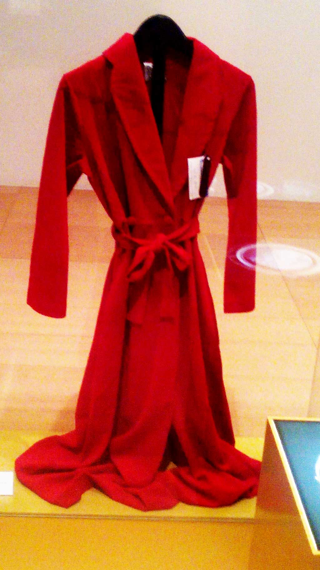 Bata deseño de GOA.